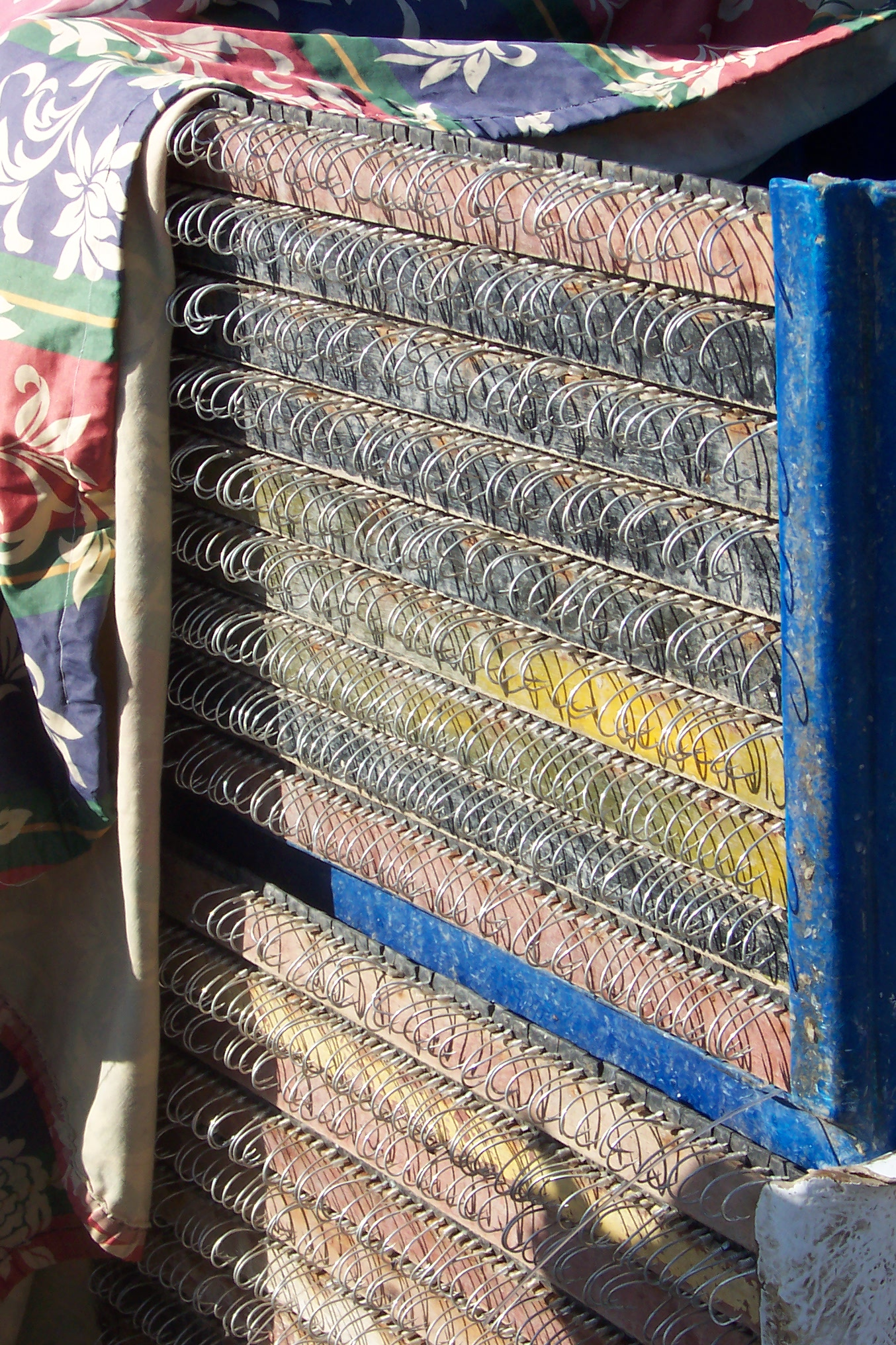 Palangre recollit al port de Llançà